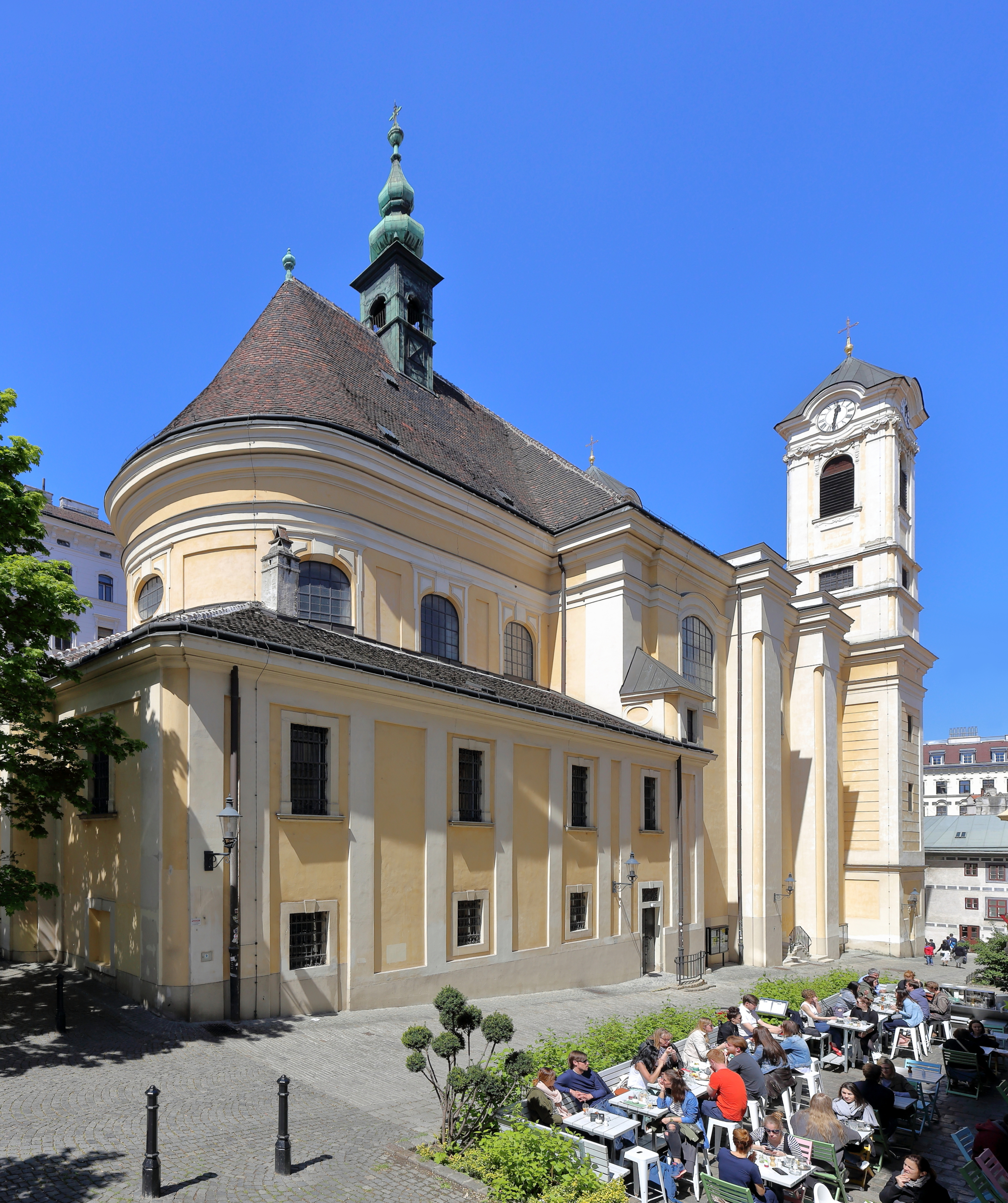 Südostansicht der Ulrichskirche im 7. Wiener Gemeindebezirk Neubau.Die Kirche wurde am ehemaligen rechten Steilufer des Ottakringer Bachs (Neustiftgasse) erbaut. Die Vorgängerkirche wurde 1529 und 1683 bei den Türkenkriegen zerstört. Der heutige einschiffige, dreijochige Kirchenbau wurde von 1721 bis 1724 errichtet und die Türme von 1752 bis 1771.